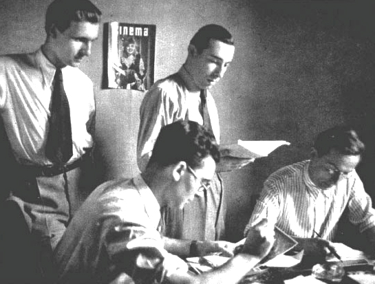 La redazione di Cinema - prima serie - anno 1939: Francesco Pasinetti, Domenico Meccoli, + Fausto Montesanti + Rudolf Arnheim